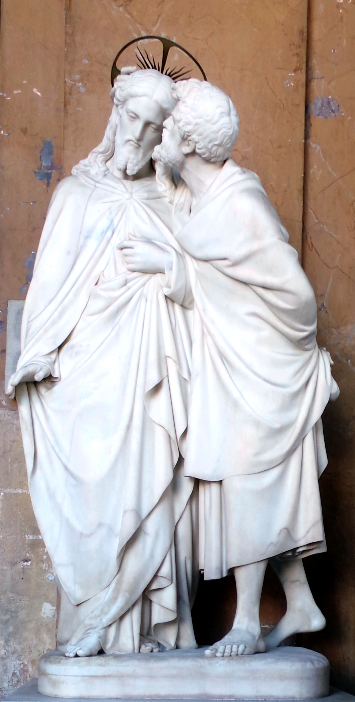 OSCULO FILIUM HOMINIS TRADIS (Lukas 22,48), „Mit einem Kuss verrätst du den Menschensohn": Jesus und Judas in einer Skulptur aus dem Jahr 1852 in der Scala Santa (Lateran) in Rom